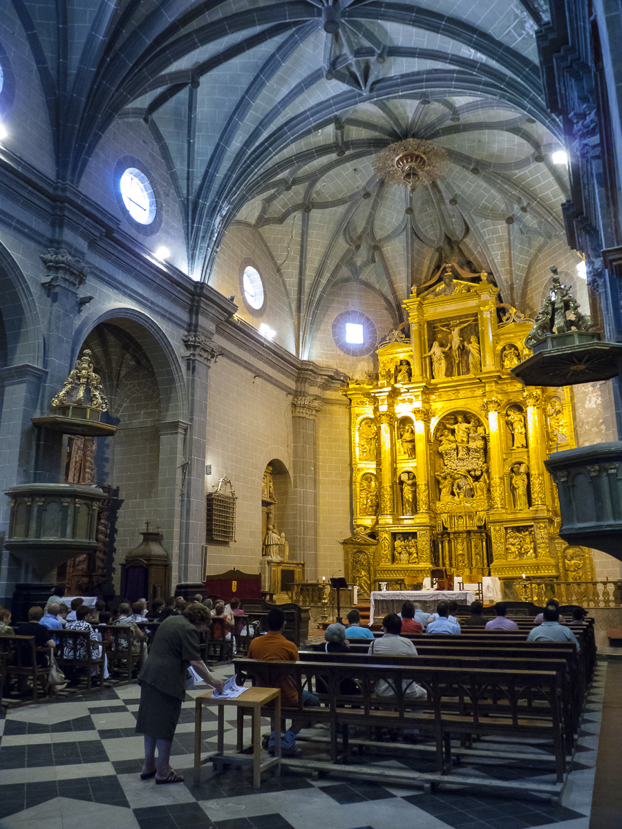 18072010 122453 ALB 1153